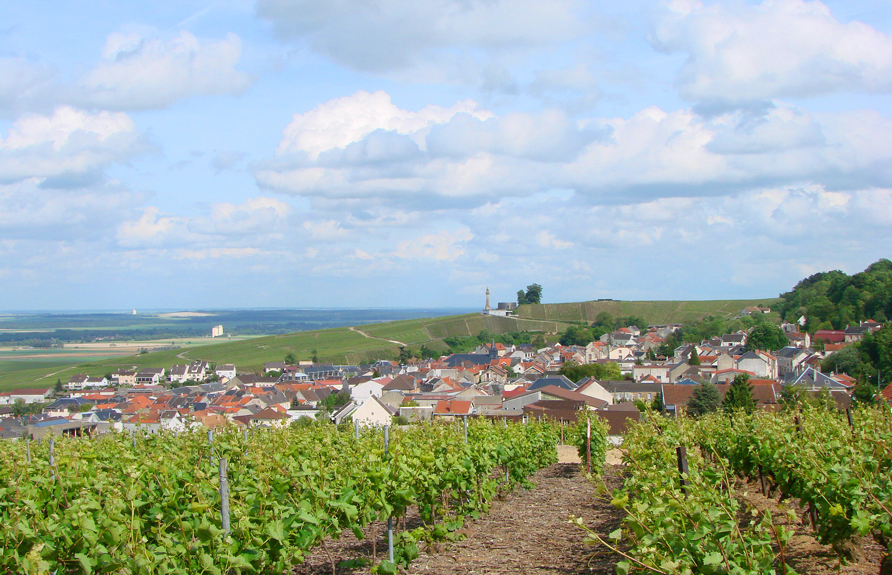 Verzenay, village de la Montagne de Reims,Marne(51),France.Vignoble du champagne.